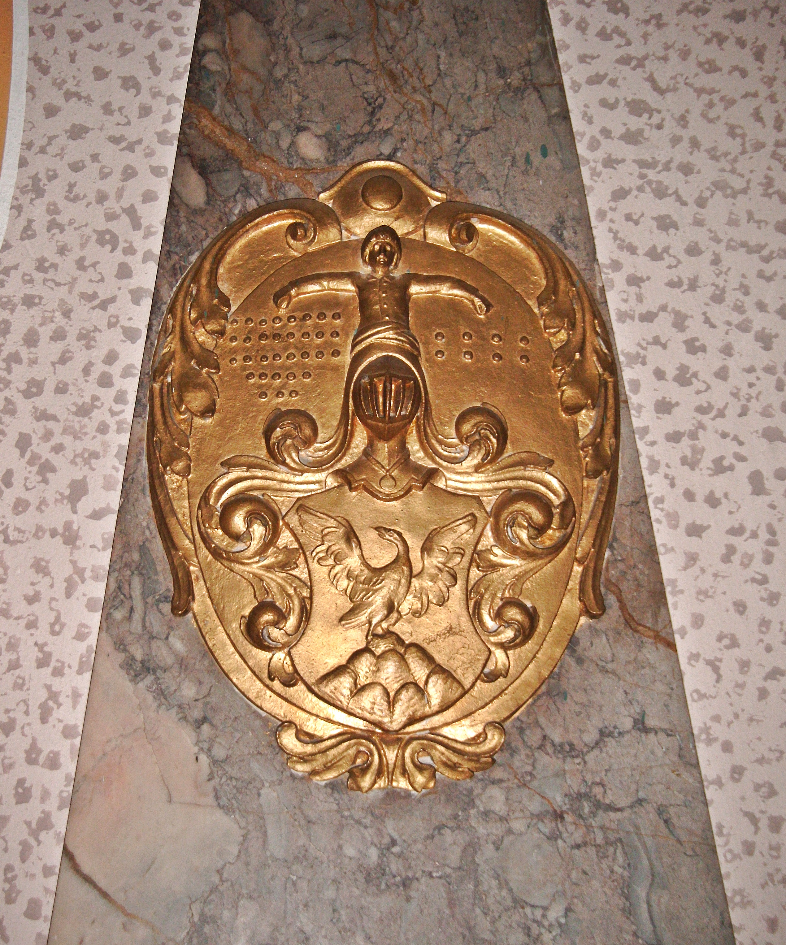 Wappen der pfalz-bayerischen Familie von Babo, vom Grab der Ehefrau des Geheimrates und Hofkammerdirektors Johann Lambert von Babo (1725-1799), in der St. Laurentius Kirche, Weinheim.